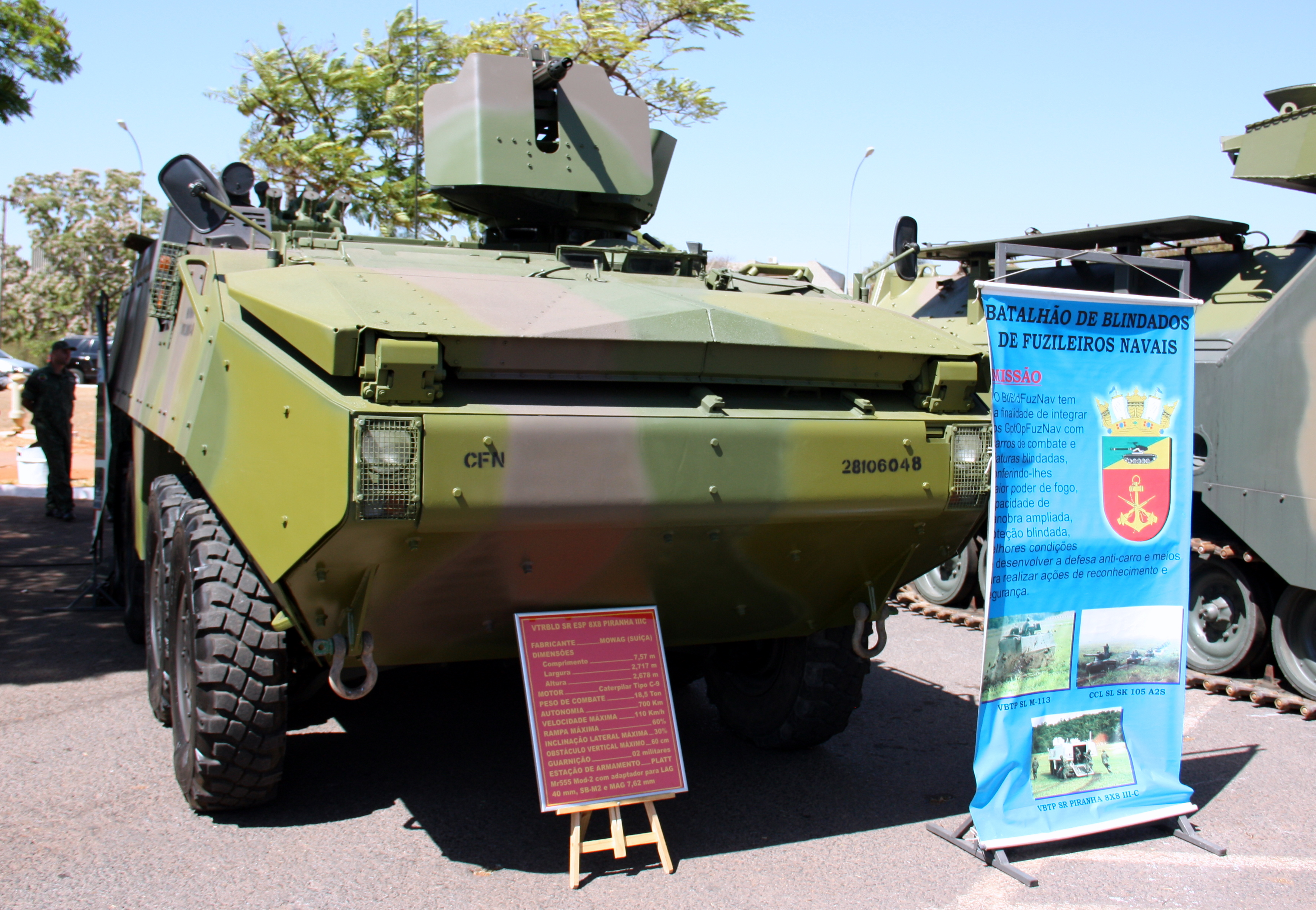 Corpo de Fuzileiros Navais Marinha do Brasil